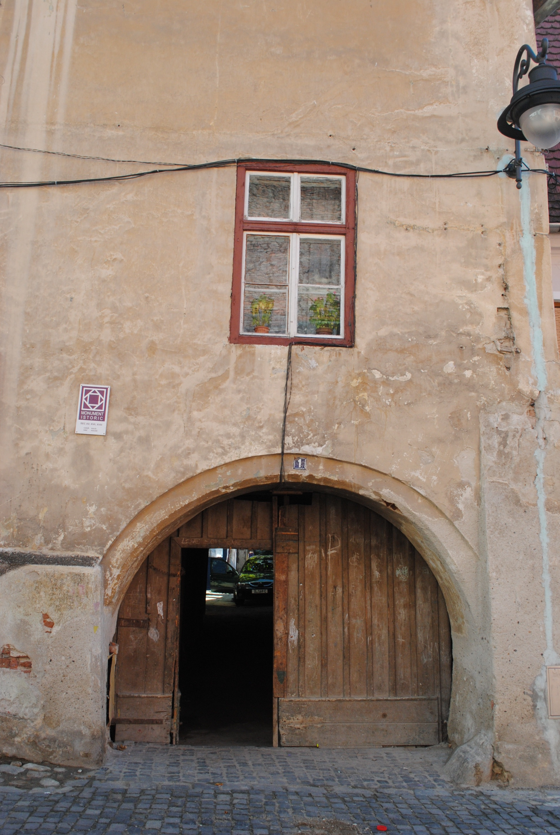 Casă, sec. XV, sec. XVII, sec. XVIII